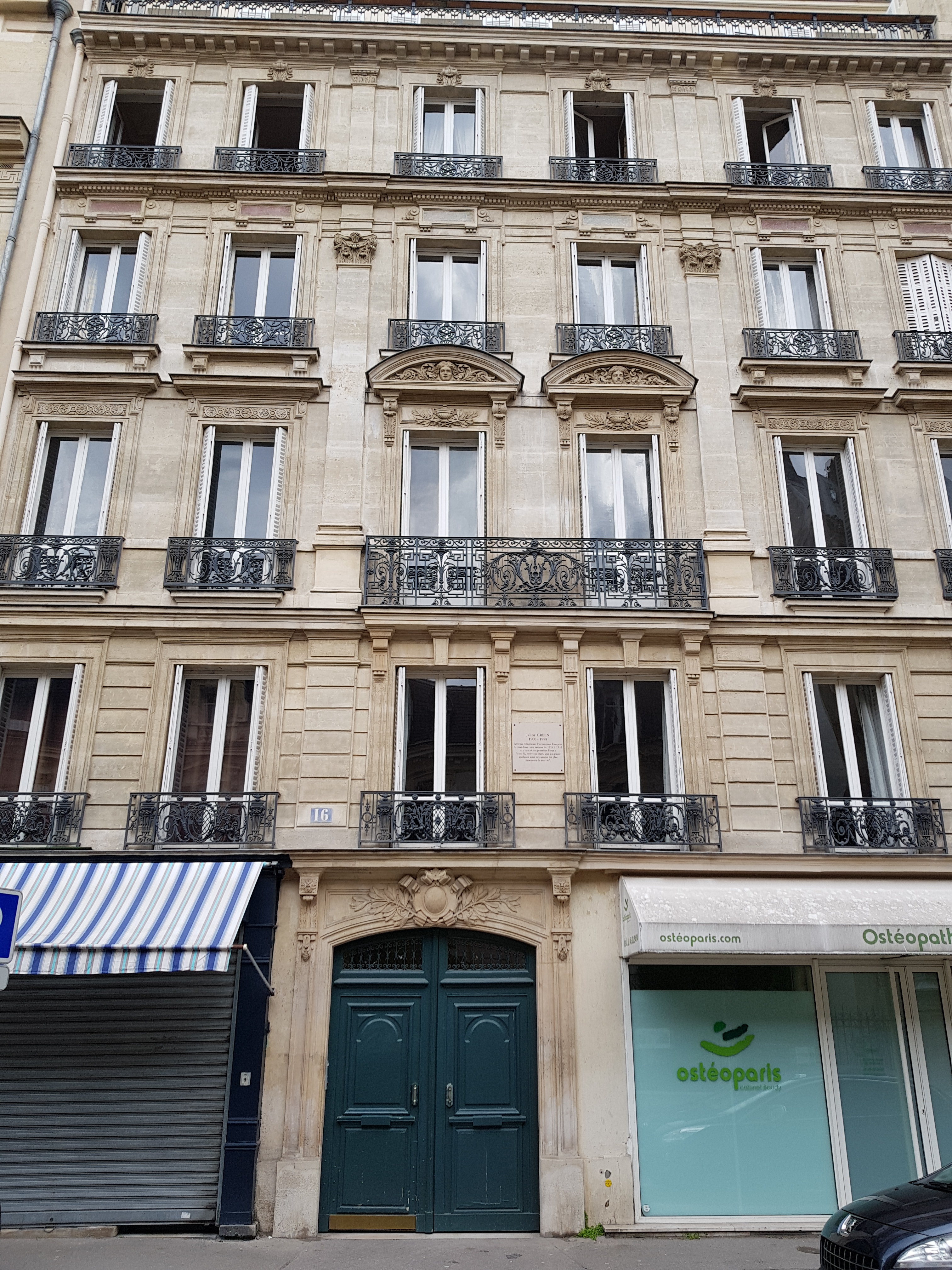 Immeuble situé au 16 de la rue Cortambert, Paris 16e. C'est au premier étage que se trouvait l'appartement familial de l'écrivain américain Julien Green, où sa famille habita de 1916 à 1932 et où il écrivit ses premiers livres.